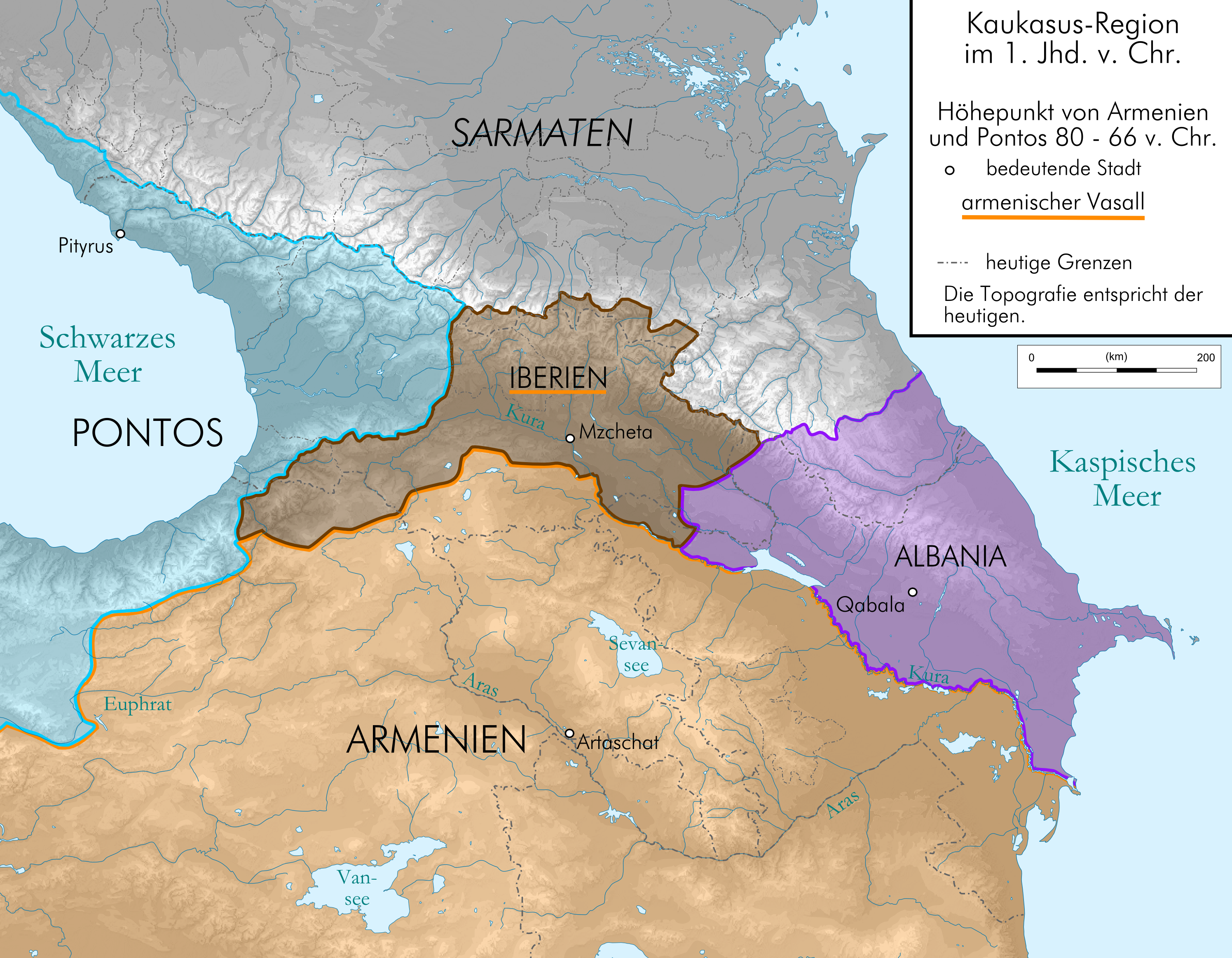 Kaukasus-Region um 80 v. Chr. Quellen sind File:Geor_earliest_2A.jpg , Putzger historischer Weltatlas Ausgabe 2005, , Heinz Fähnrich: Geschichte Georgiens von den Anfängen bis zur Mongolenherrschaft. Shaker, Aachen 1993, ISBN 3-86111-683-9.